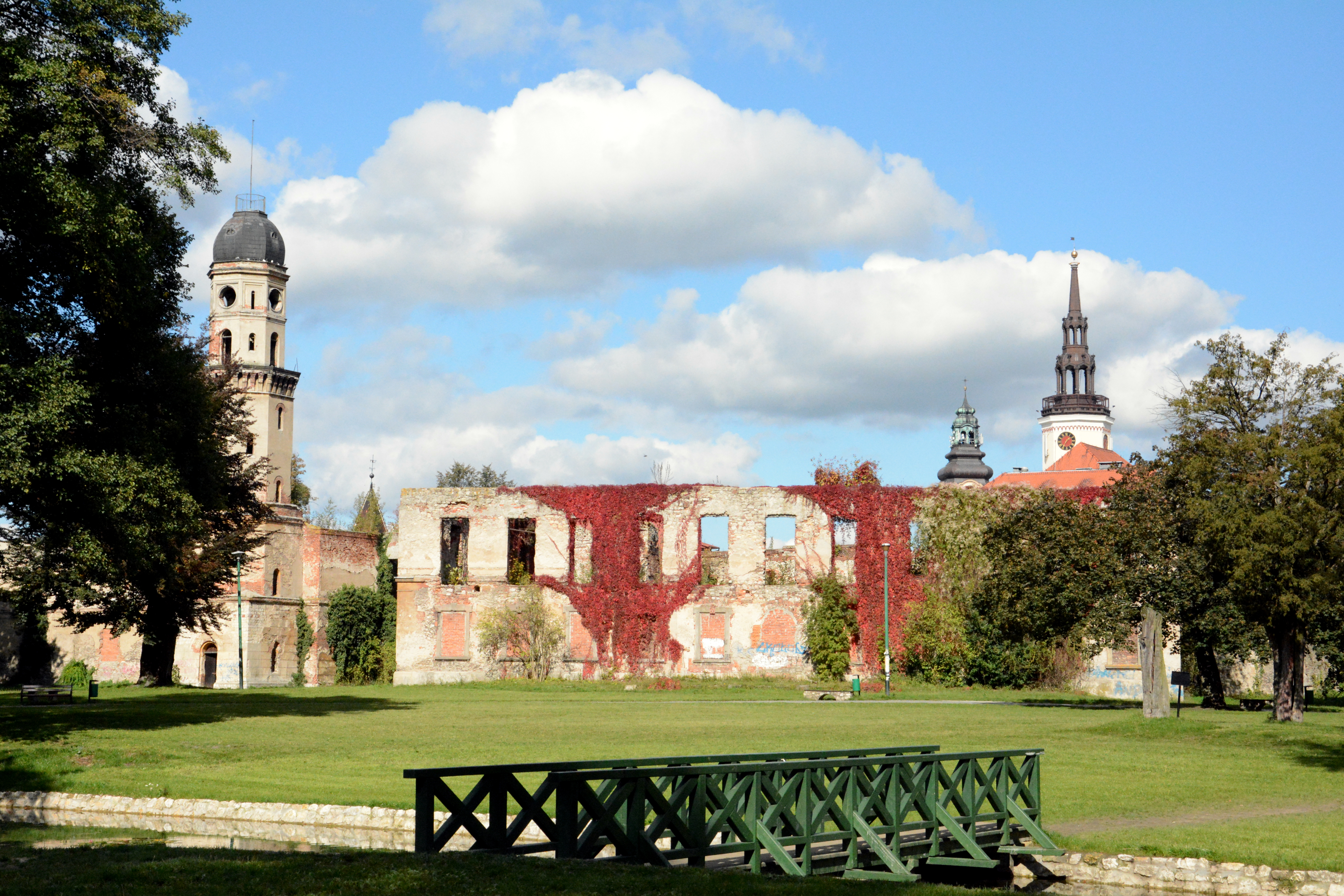 Strzelce Opolskie, zamek (ruina), XIV, 1562-1592, XVIII, XIX